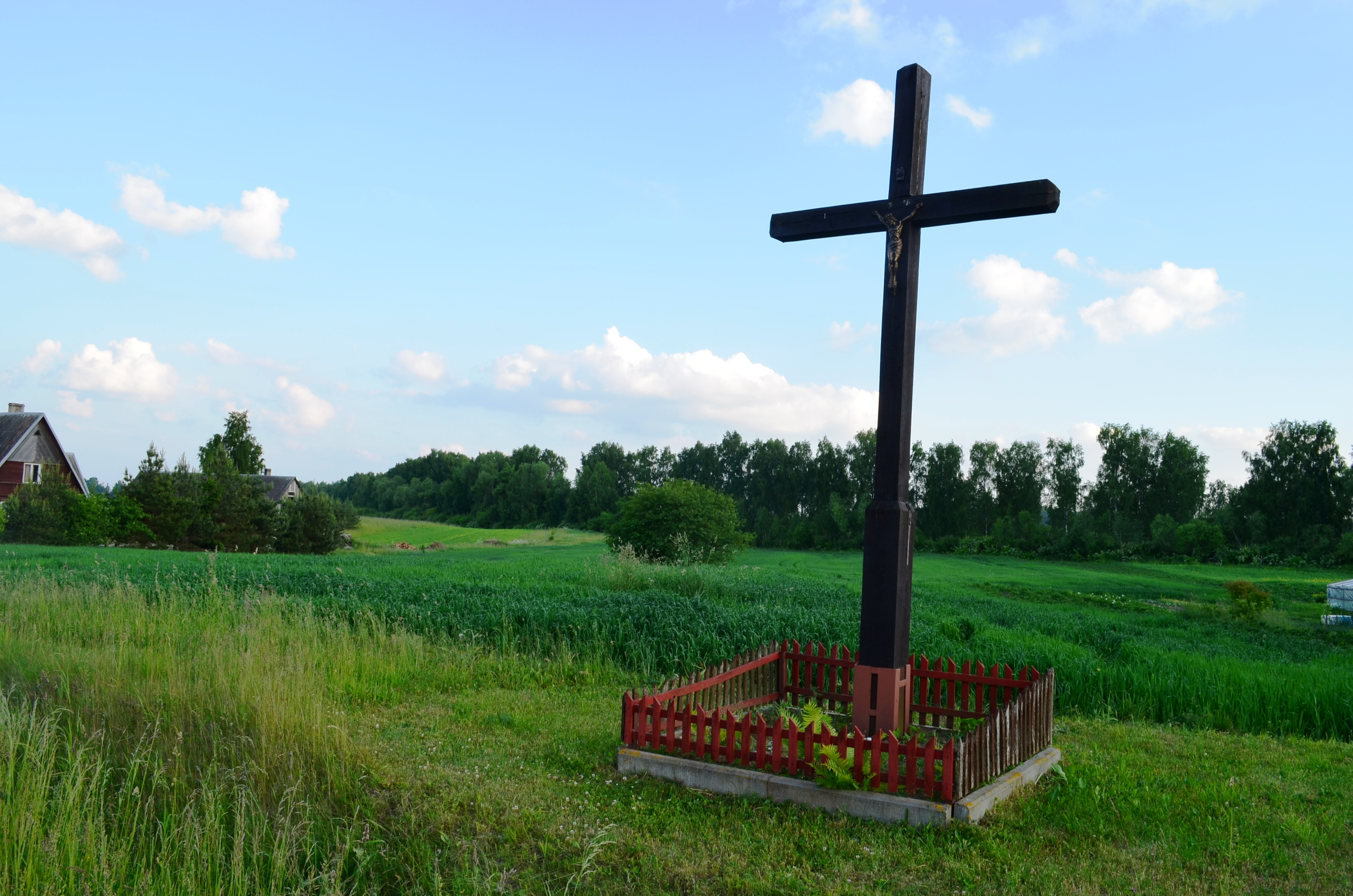 Kryžius, Narezkai, Trakų raj.